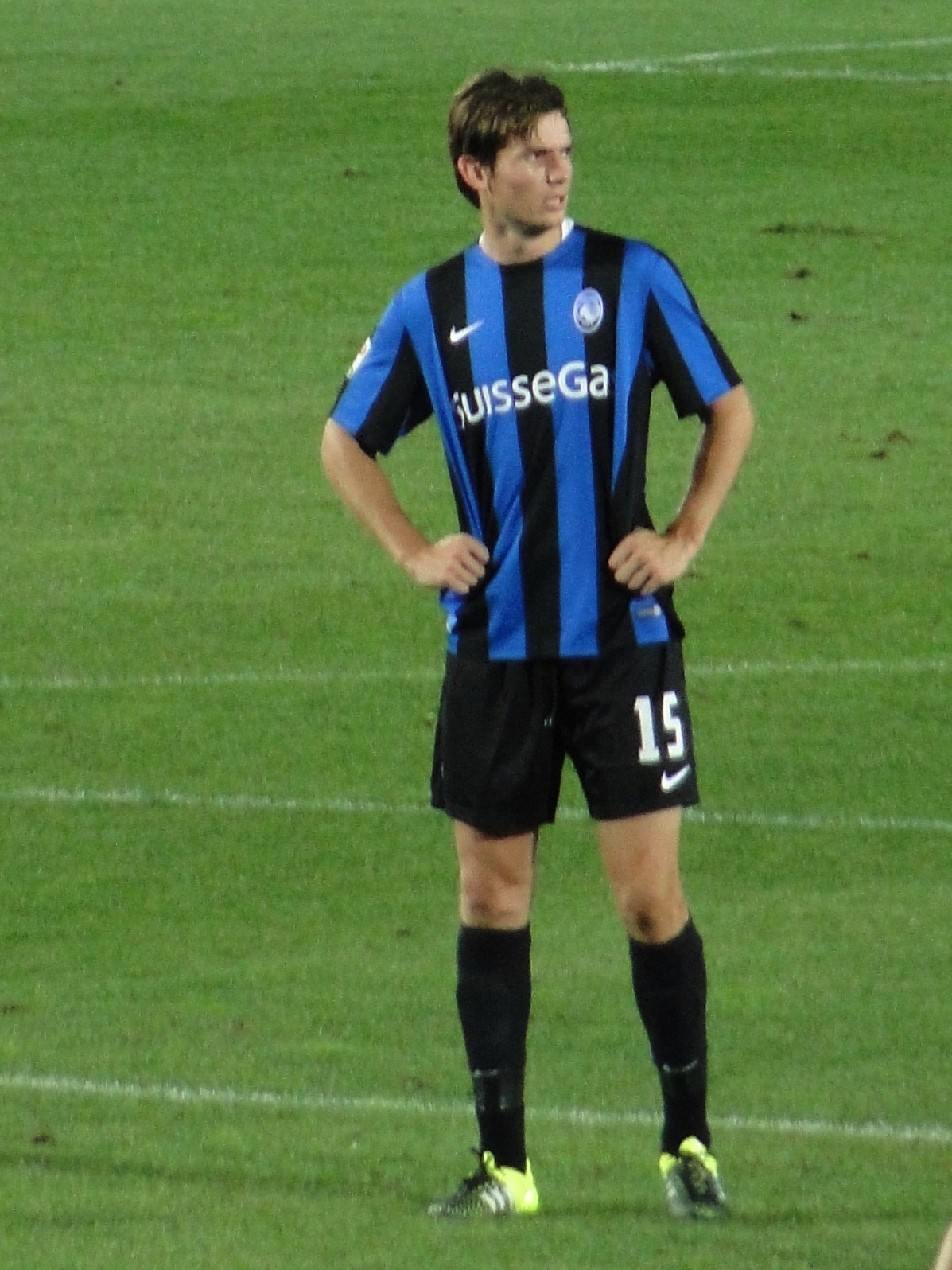 Marten de Roon, calciatore olandese, con la maglia dell'Atalanta